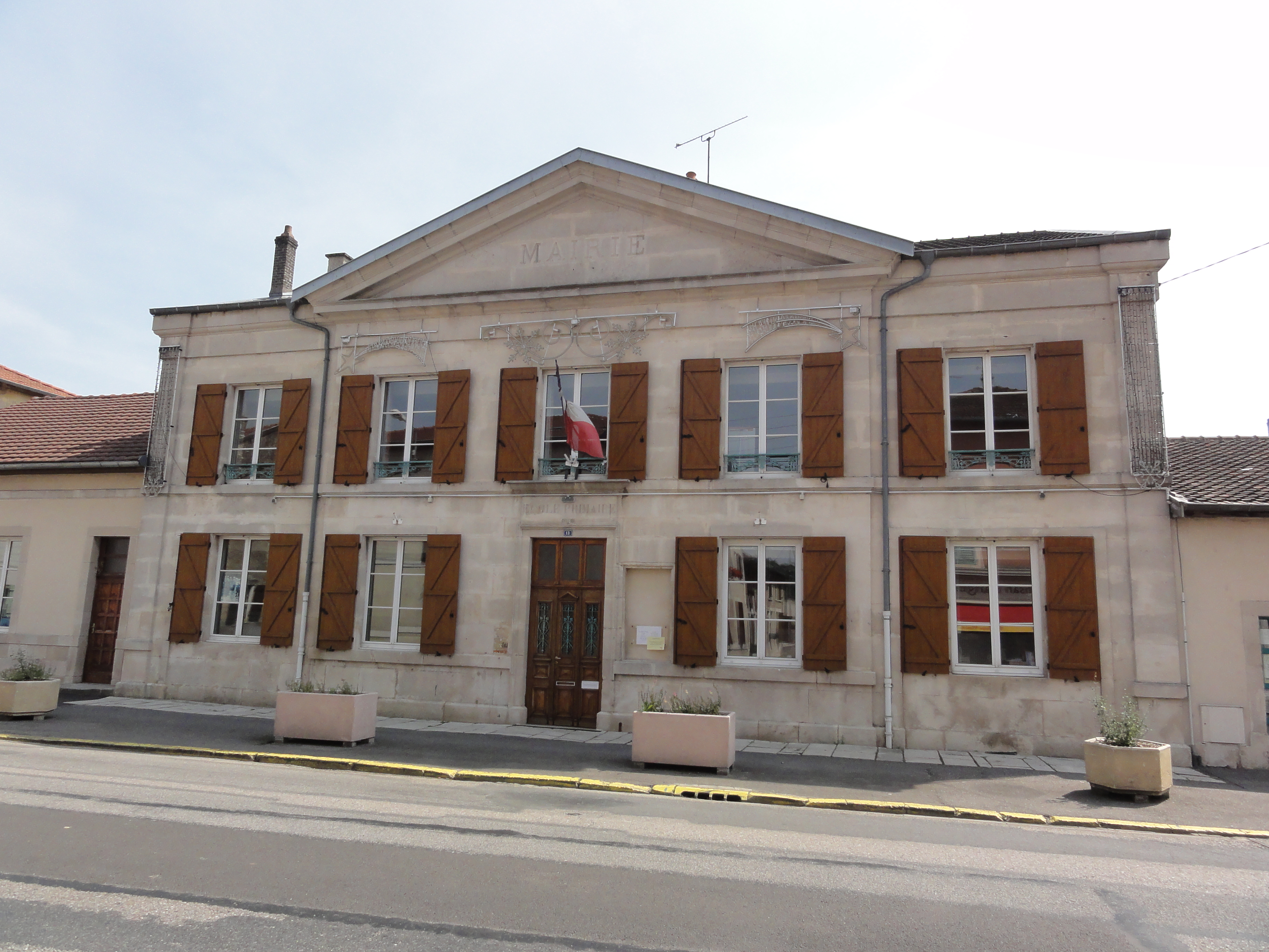 Vignot (Meuse) mairie-école